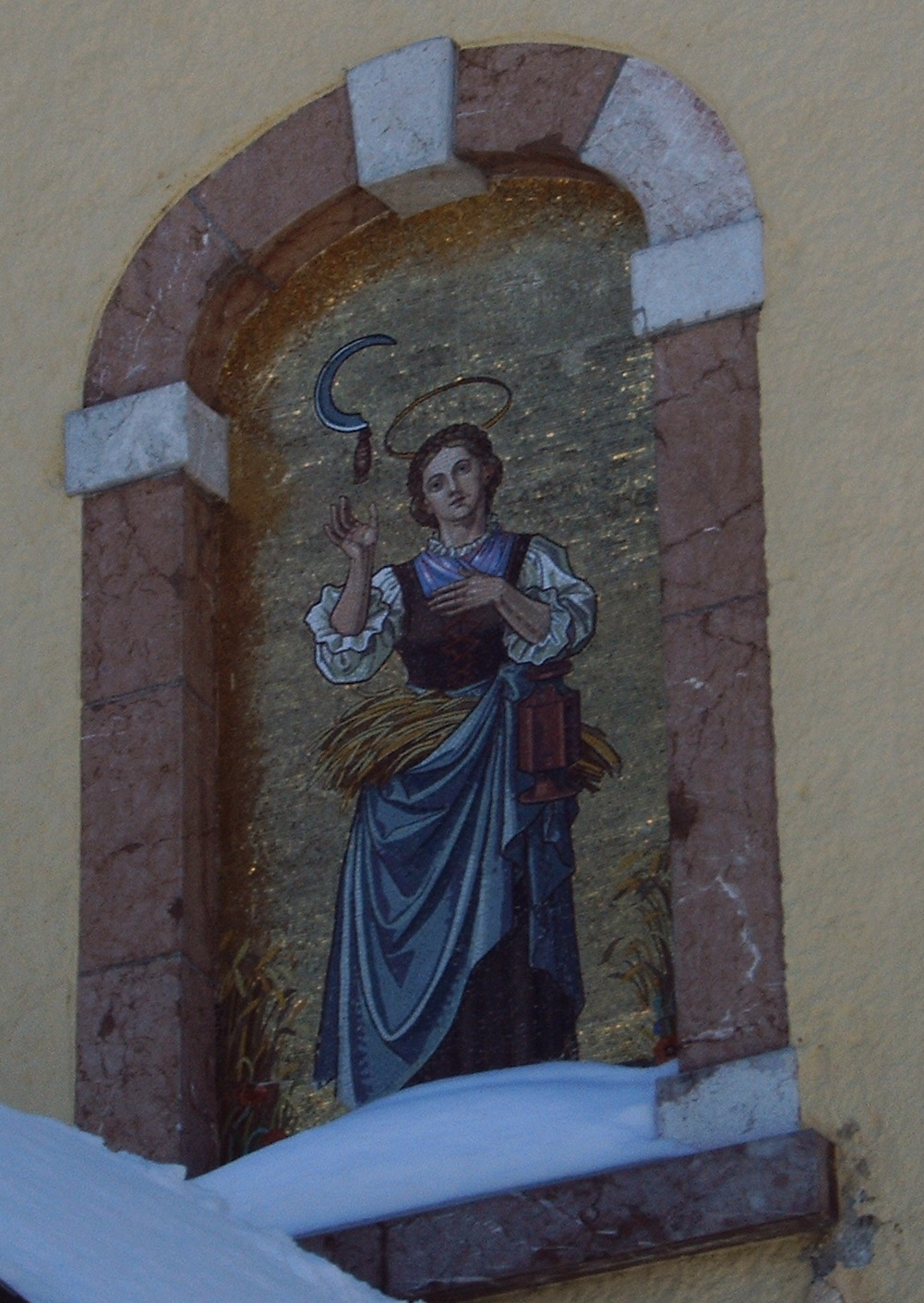 Tiroler Volksheilige Notburga von Rattenberg, Außenaufnahme von der Fassade der St. Norburga Kirche in Eben am Achensee/Tirol